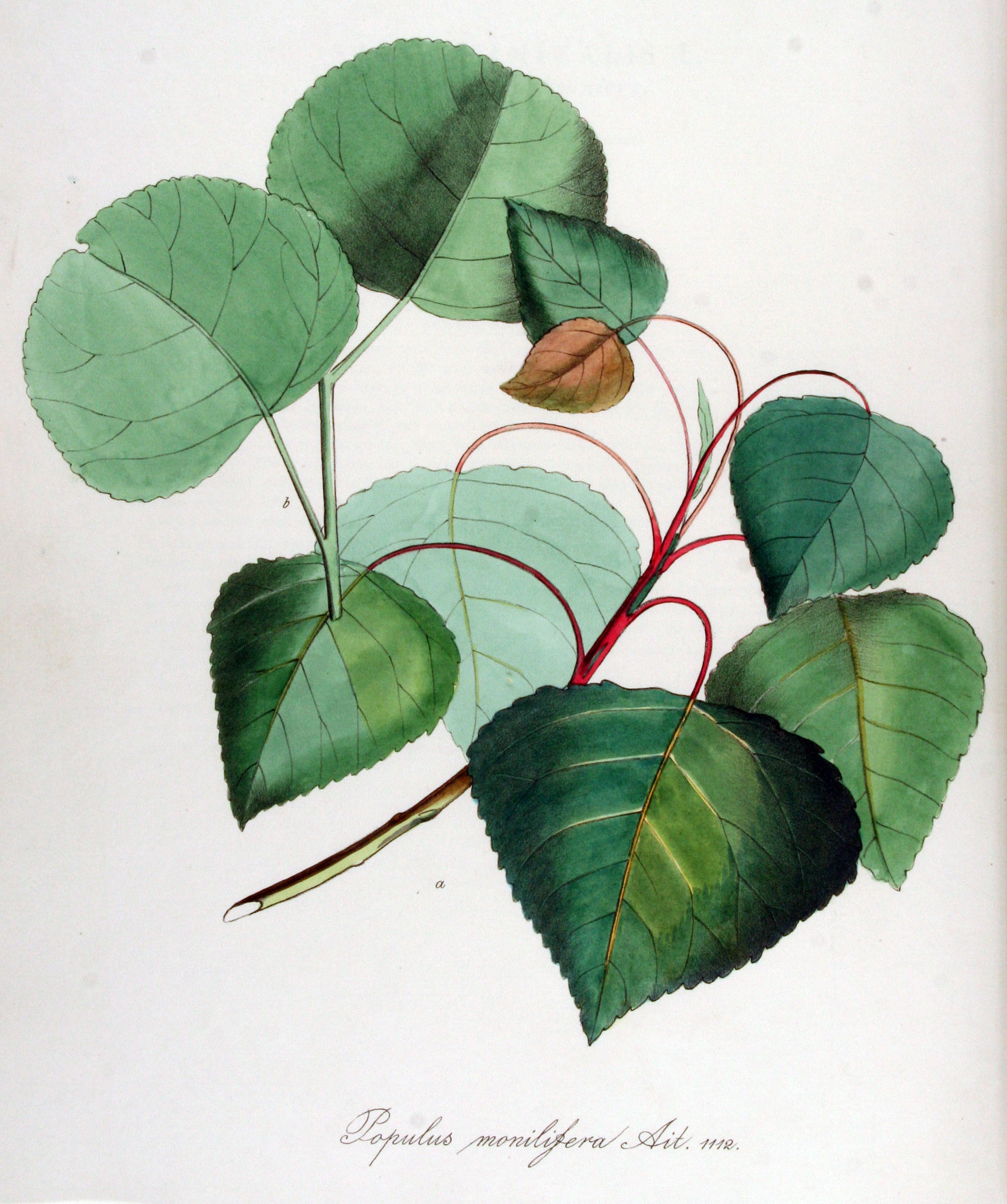 Populus ×canadensis Moench (Syn. Populus monilifera Ait.)